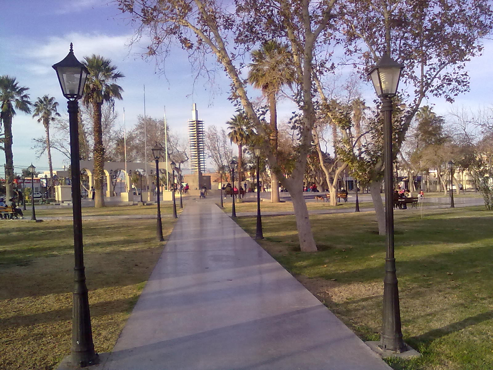 vista a pleno de la plaza de la capital